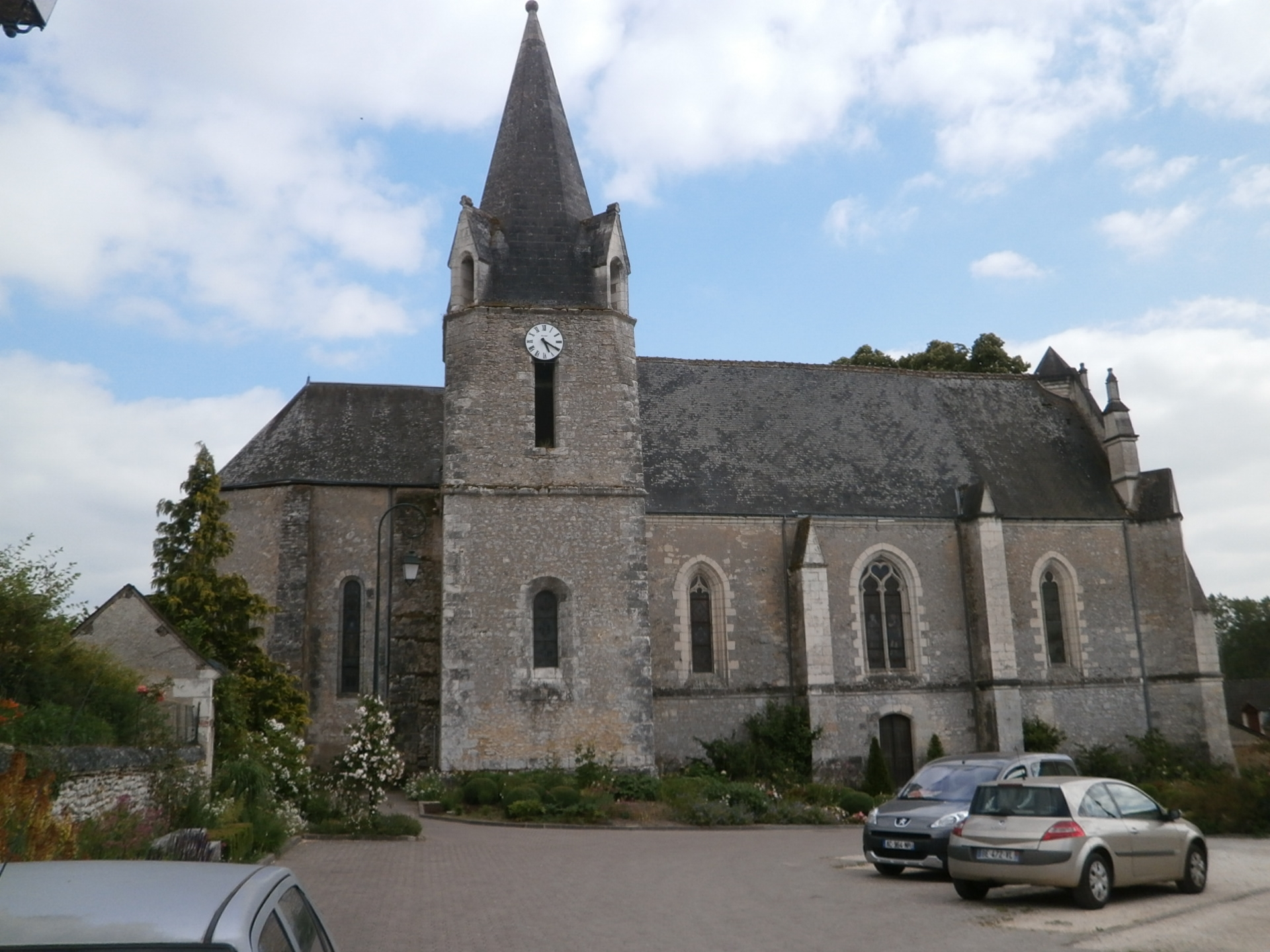 L'église Saint-Pierre-ès-Liens de Chédigny (37)